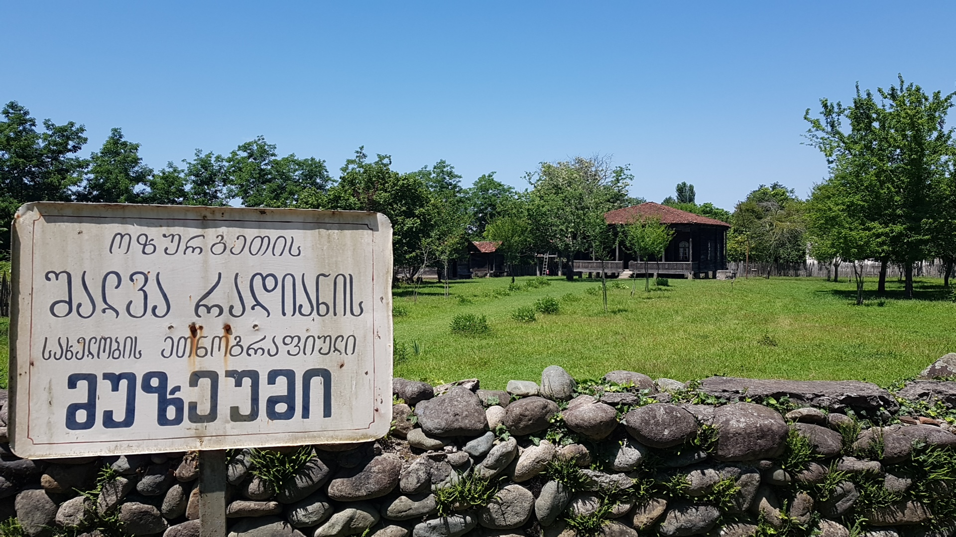 შალვა რადიანის სახელობის დვაბზუს ეთნოგრაფიული მუზეუმი